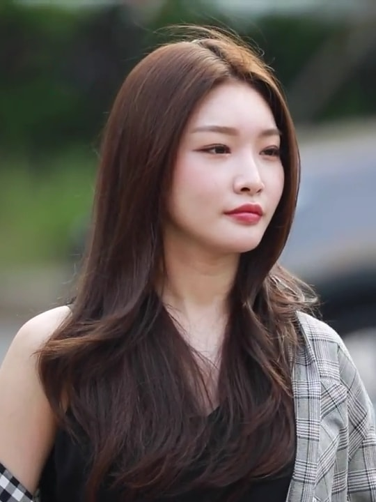 Kim Chung-ha chegando ao Music Bank da KBS, em 03 de agosto de 2018